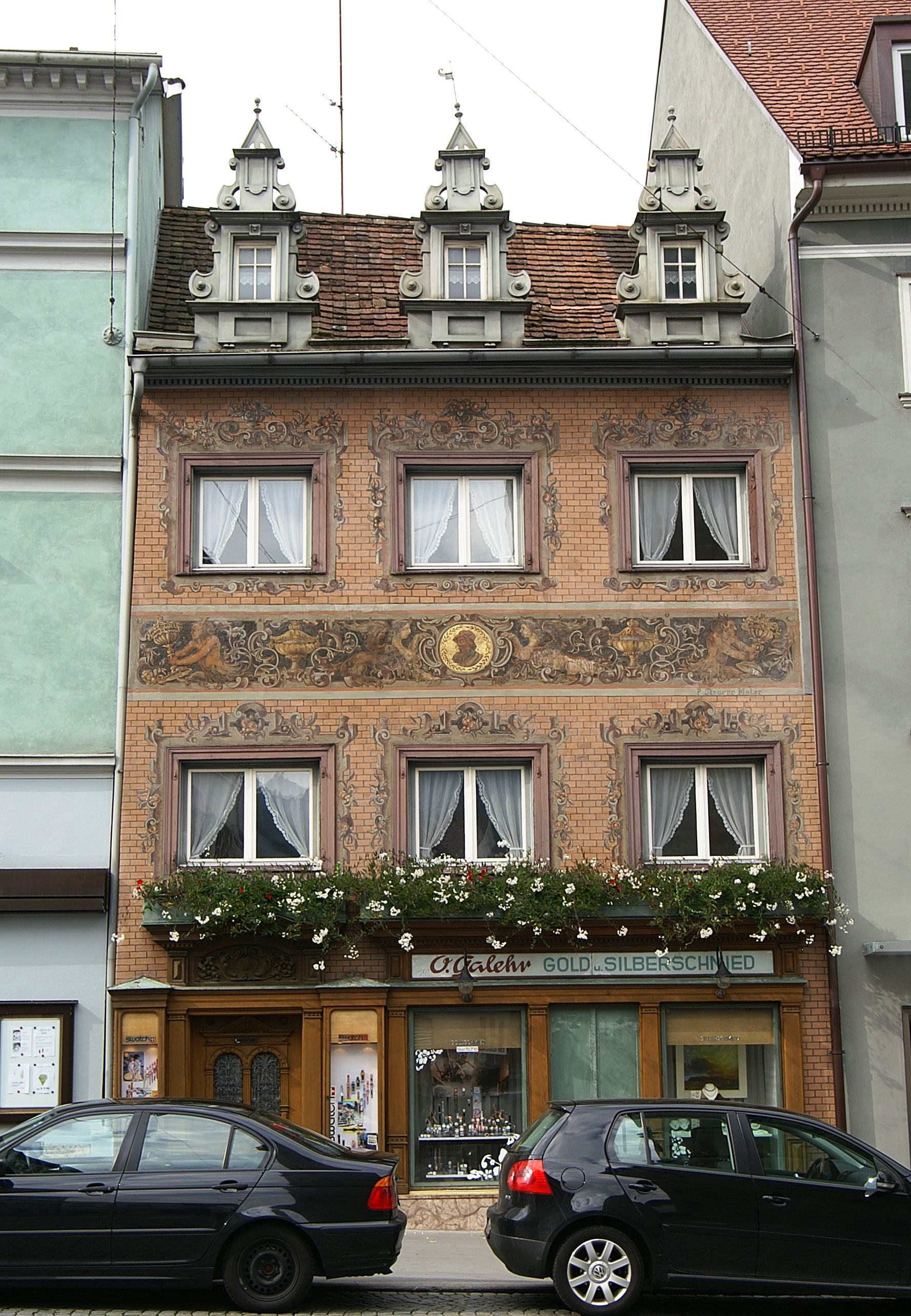 aus dem DEHIO Vorarlberg 1983: Rathausstrasse Nr.7 Späthistoristische Fassade, Satteldach mit reich gestalteten Dachhäuschen, vollständig erhaltene Fassadenmalerei (imitierter Klinker, Grotesken Rollwerk-Fensterumrahmungen ) altdeutsches Haus- und Geschäftsportal (Holz) erbaut 1892. *** In Bregenz.